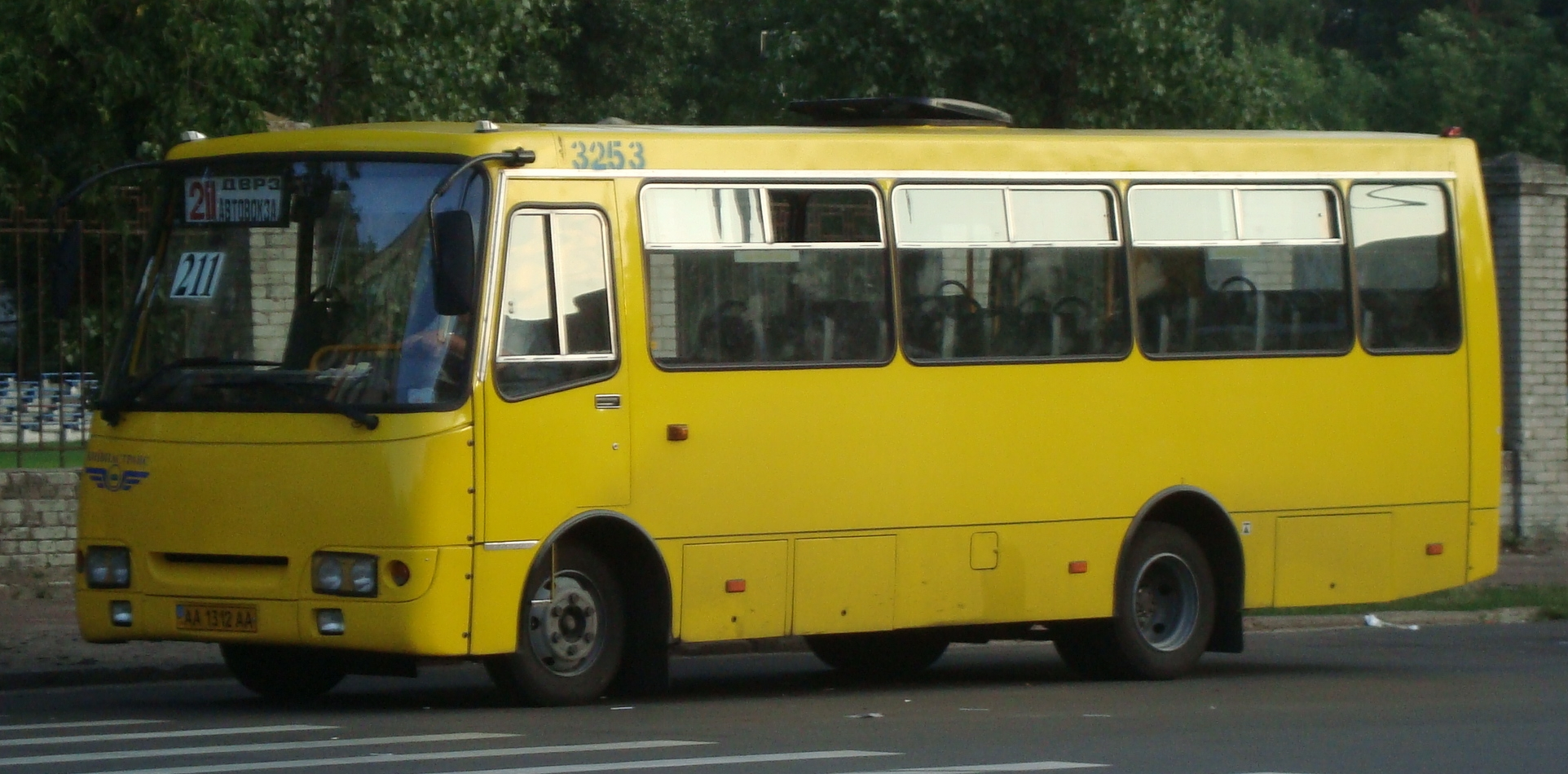 Богдан А092 у Києві.